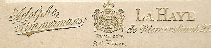 portret van advocaat J.H. Telders (1876-1937) en Theresia (Therry) Kindermann rondom hun huwelijk in 1902. Uit eigen prive-collectie familie.